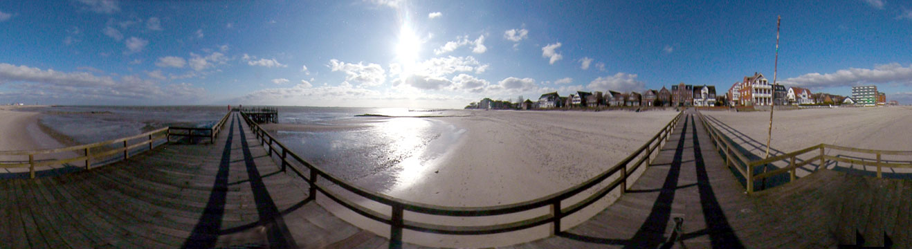 360° Ansicht von Wyk auf Föhr von der Seebrücke.